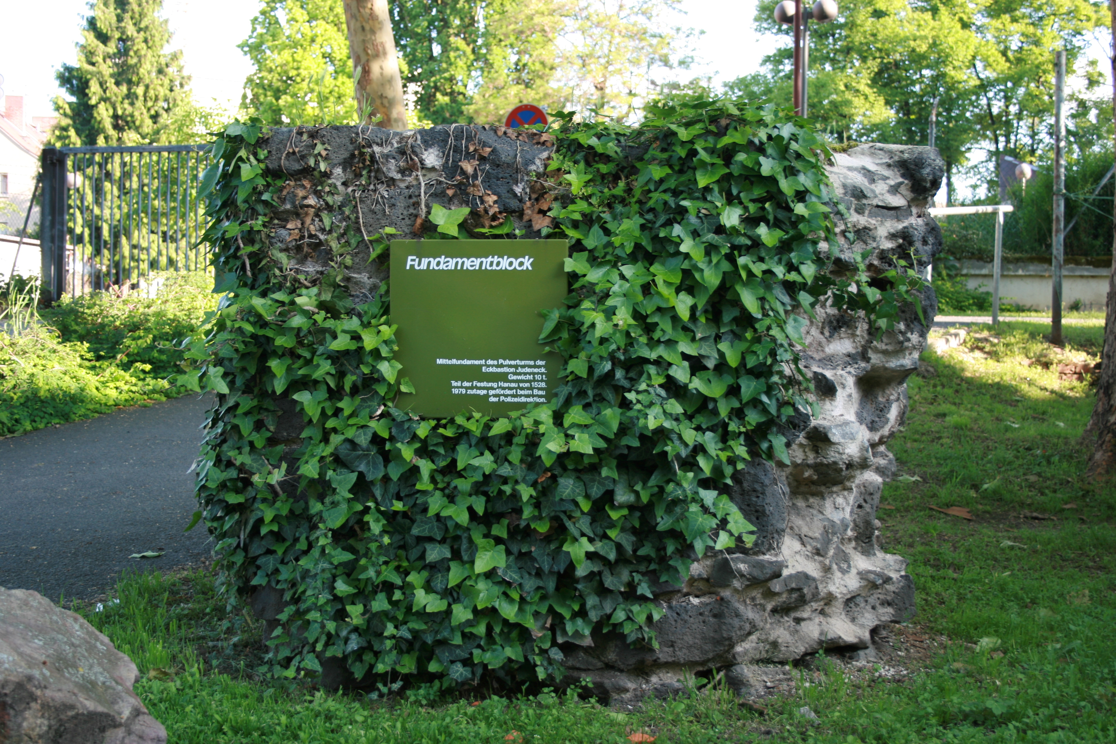 Fundamentblock eines Pulverturms der Stadtbefestigung Hanau. Beim Bau des Polizeipräsidiums entdeckt und an den Parkplatz Sandeldamm verlegt. Ehemals Teil der Bastion am Hanauer Judenviertel.